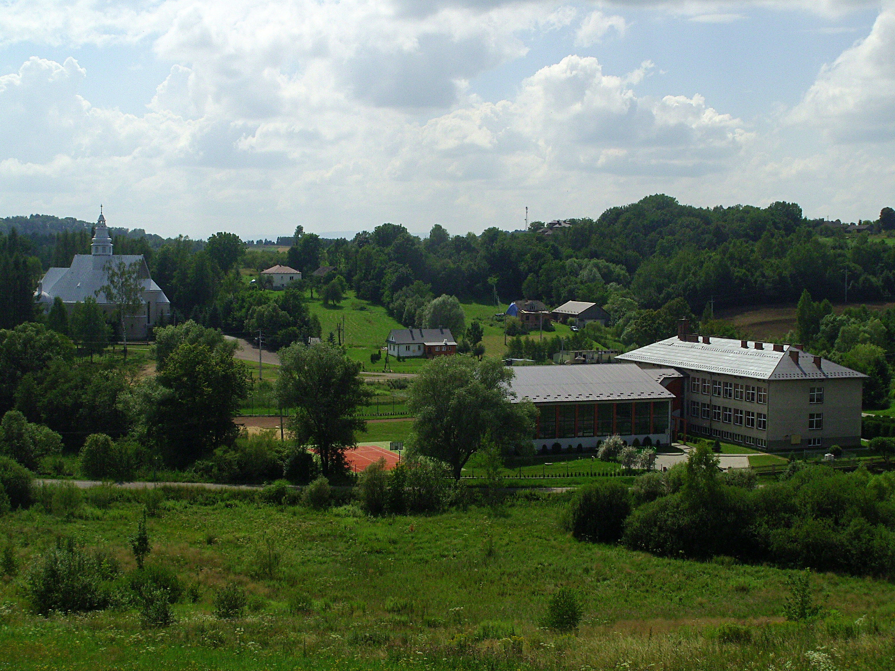 Widok na centrum Bączala Dolnego i Bączala Górnego